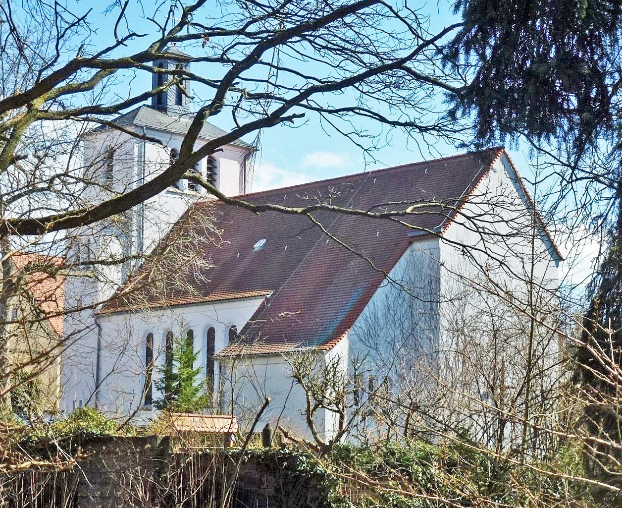 Bad Düben, katholische Kirche Heilige Famile